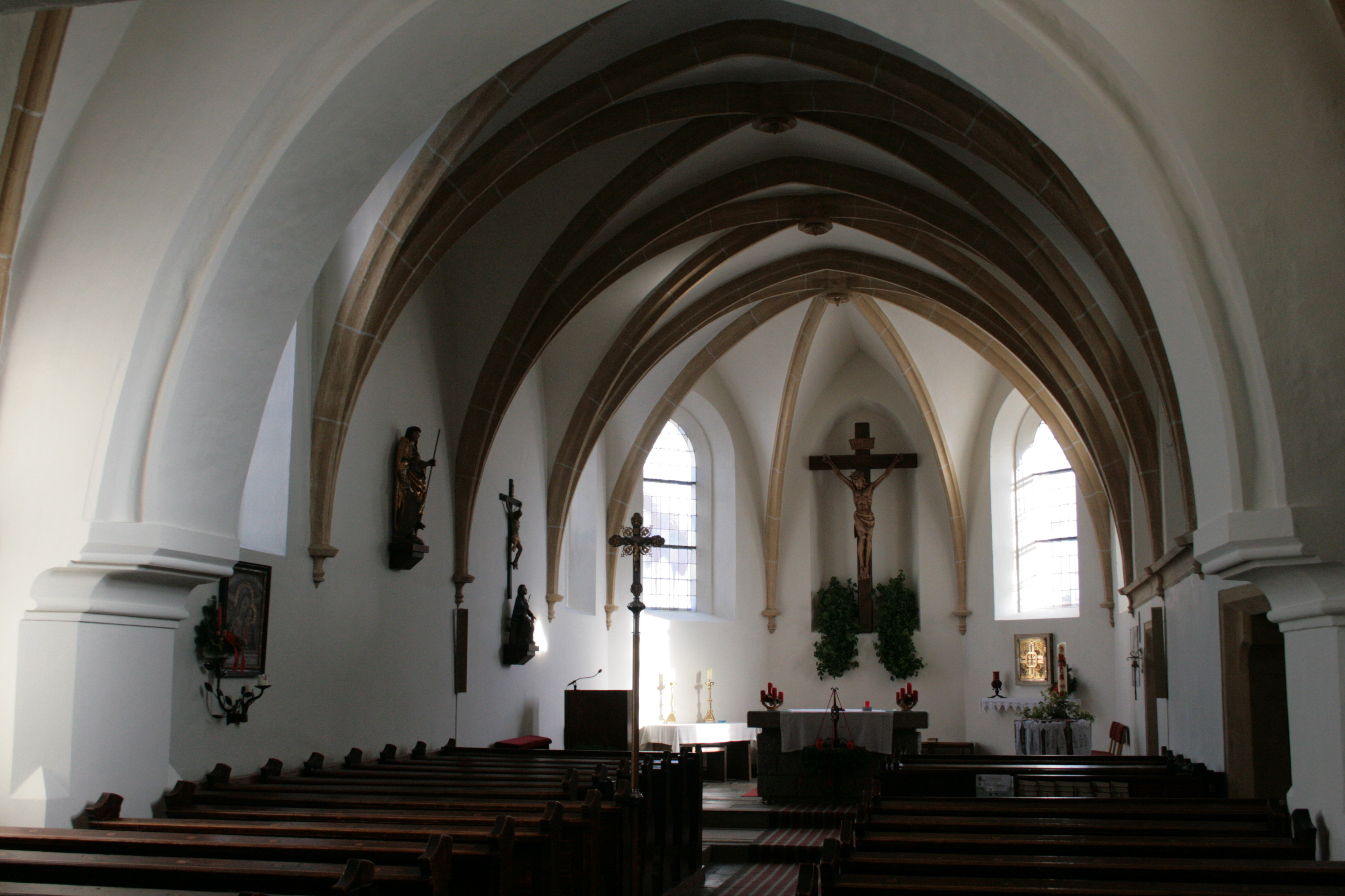 St.Georgen in der Klaus, Kath. Pfarrkirche hl. Georg